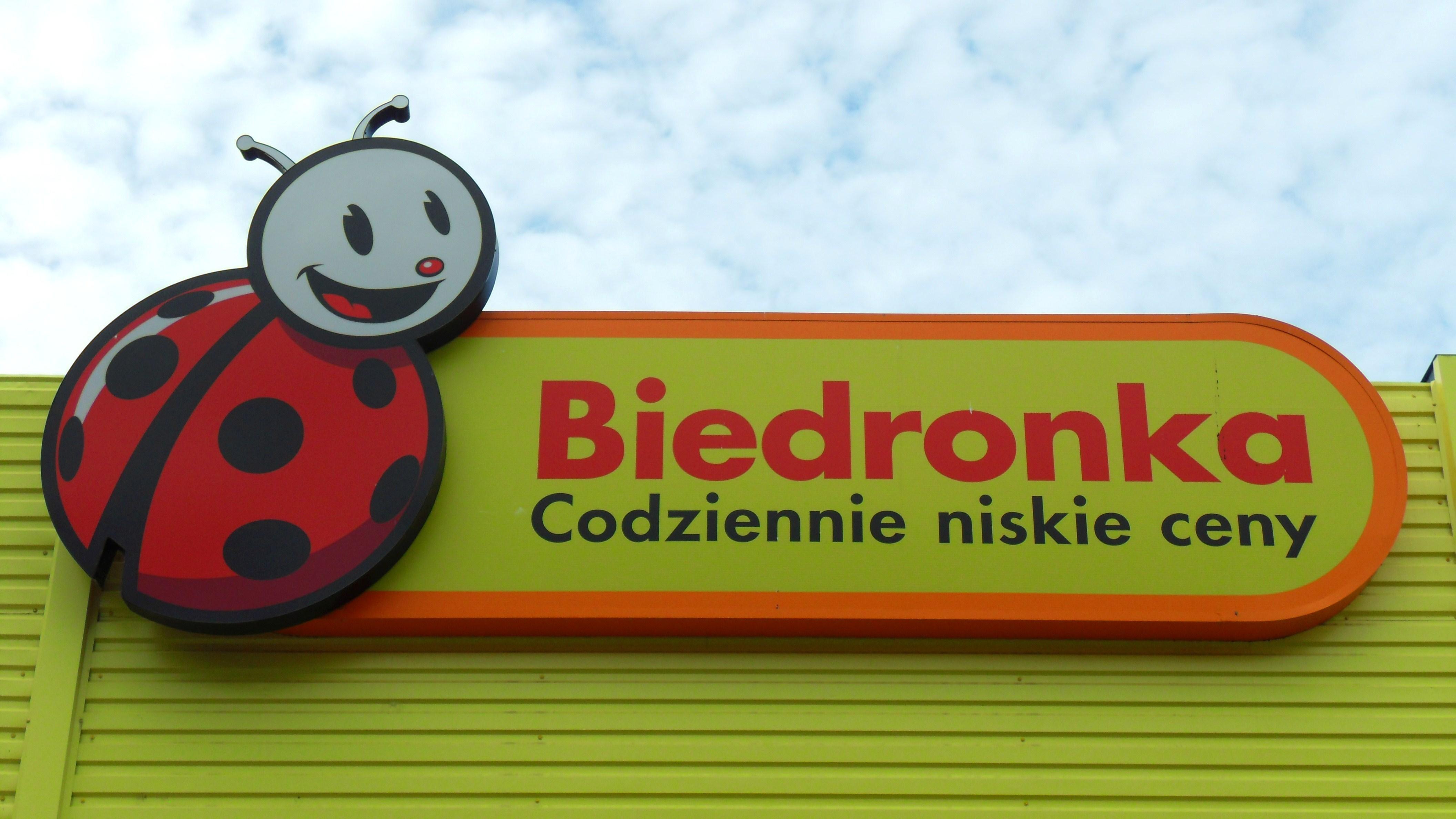 Gdańsk Żabianka. Ul. Pomorska 24, "Biedronka".